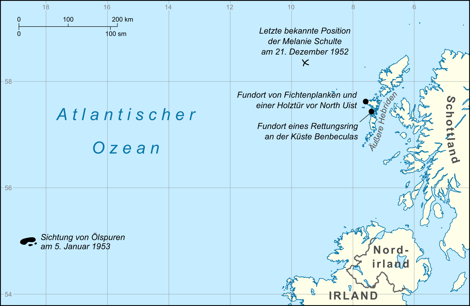 Karte des Schiffsunglückes der Melanie Schulte im Dezember 1952